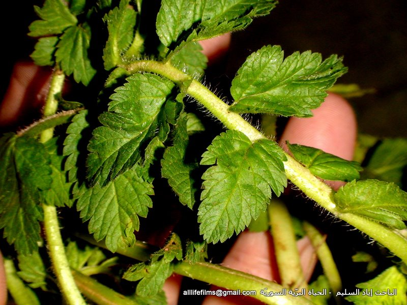 نباتات برّية سورية تؤكل